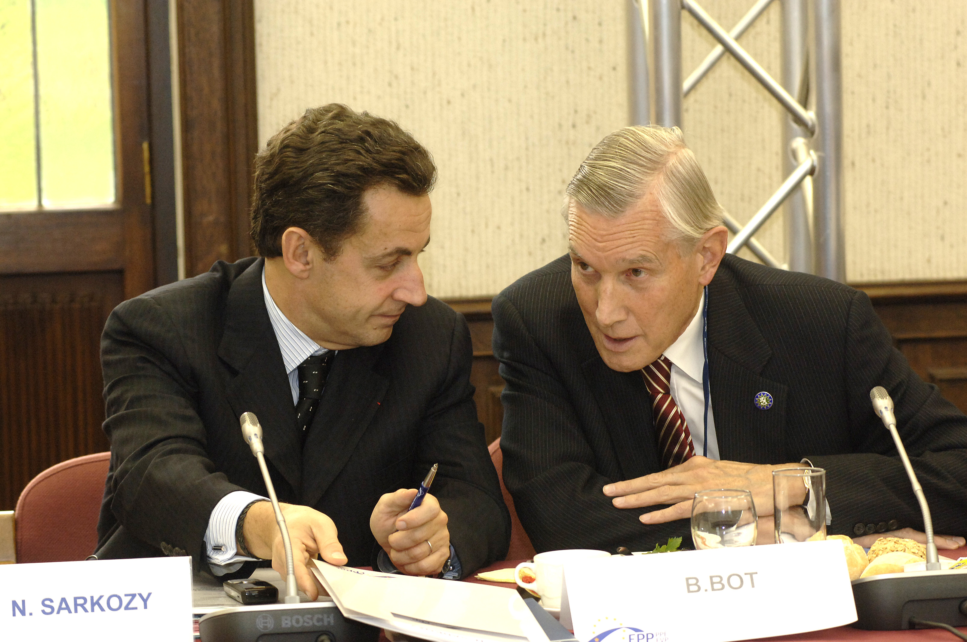 EPP Summit 14 December 2006